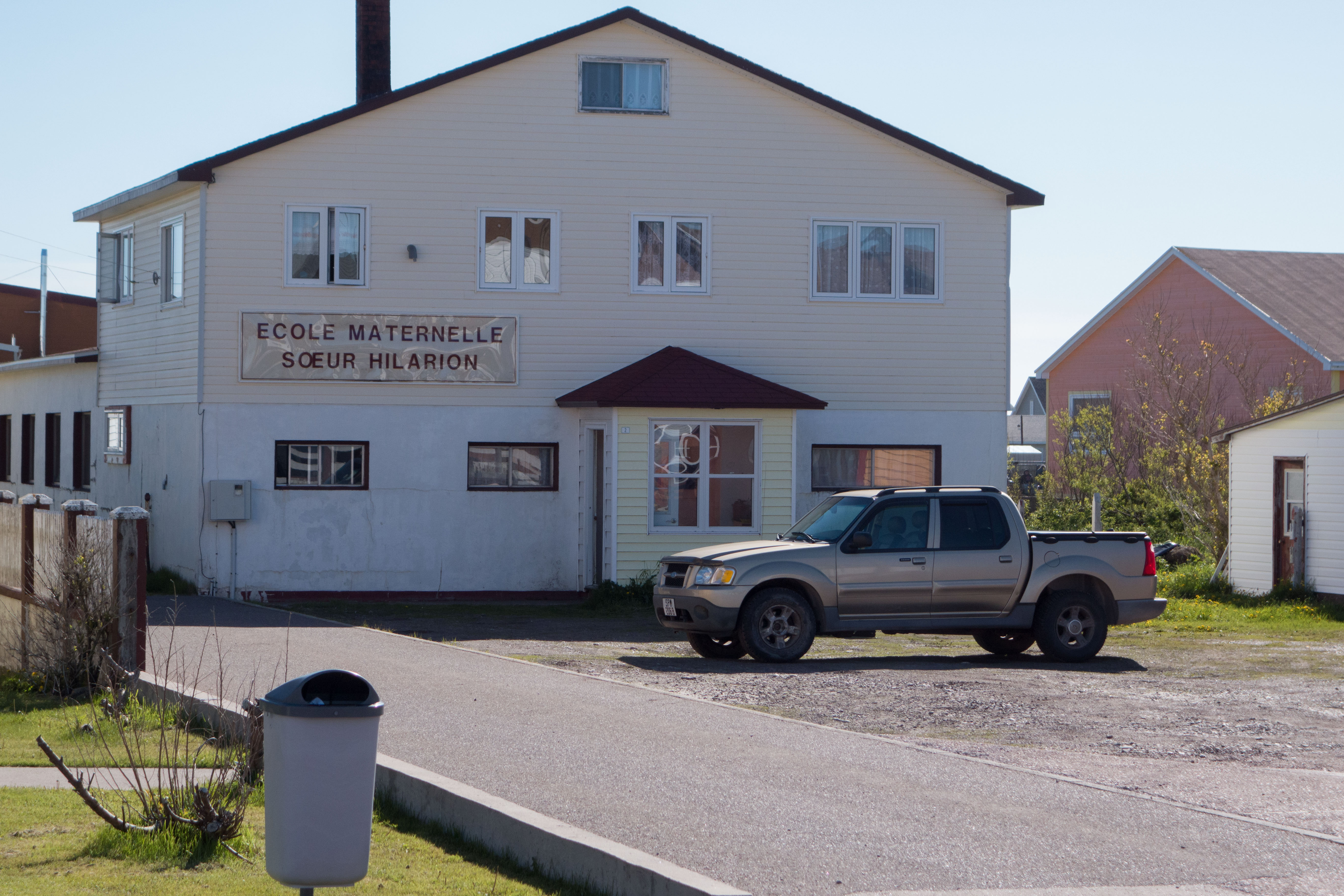 Ecole maternelle Soeur Hilarion à Miquelon